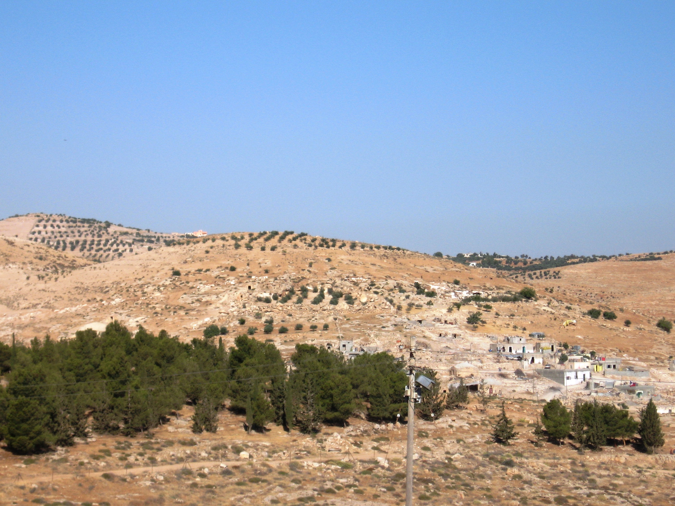 כפר שוכני המערות ברקע - בצד שמאל תל מעון העתיק - צולם מhe:מעון